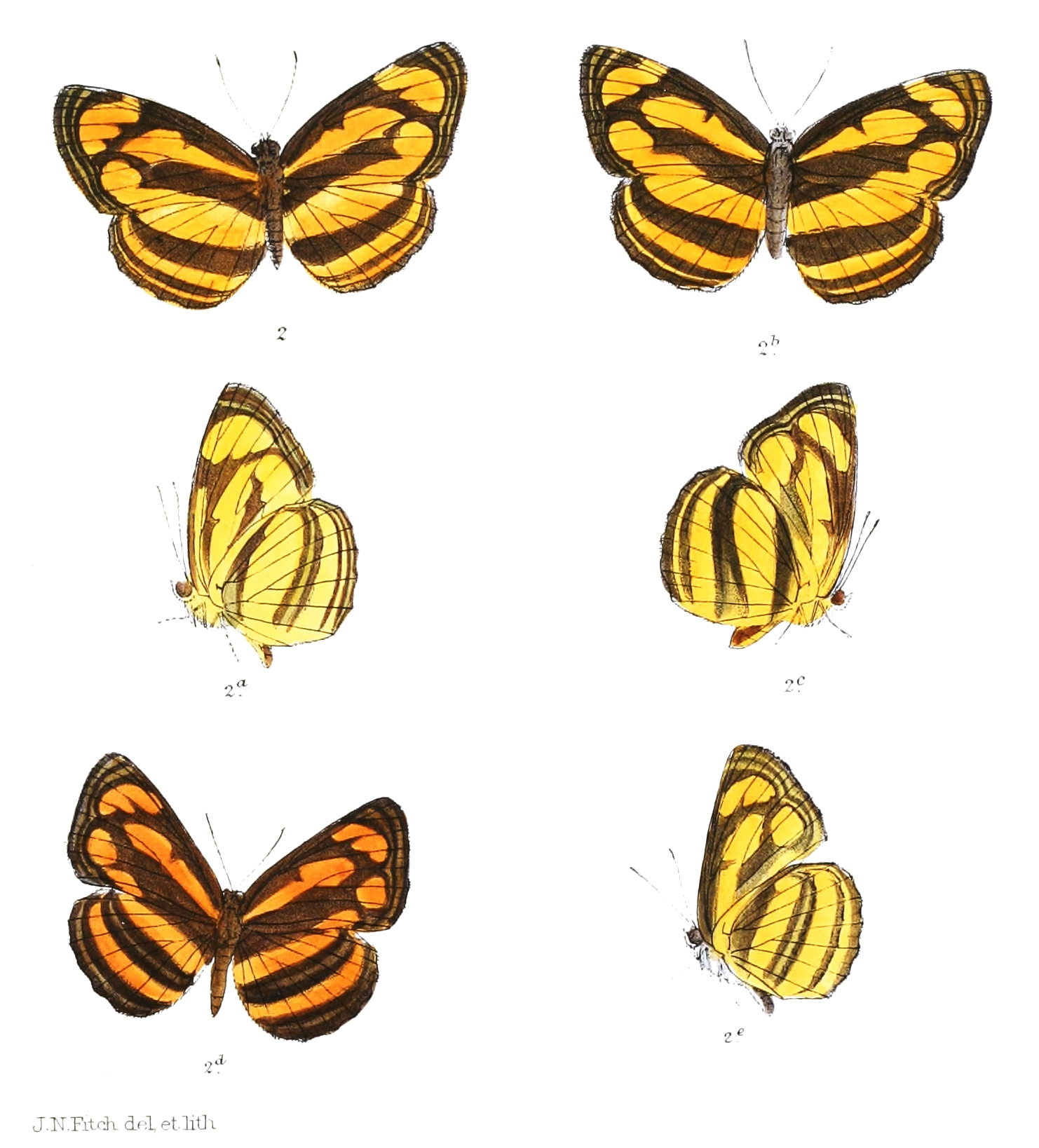 Rahinda dindinga = Pantoporia dindinga